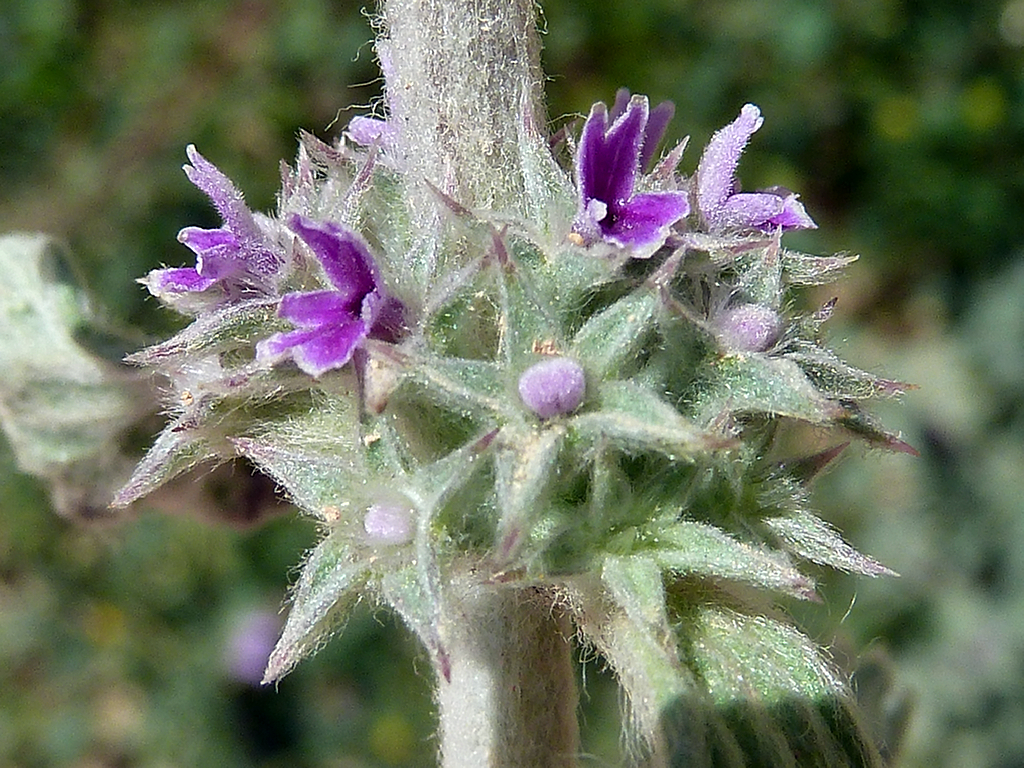 Marrubium alysson (Hierba de la rabia) : Verticilastro - Colonia Illicitana, Albatera (Alicante, España).